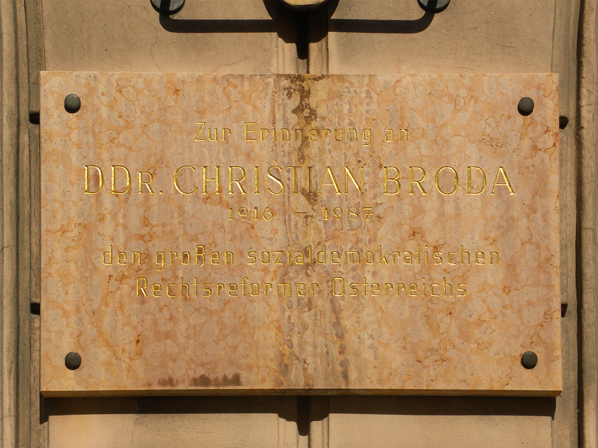 Miethaus